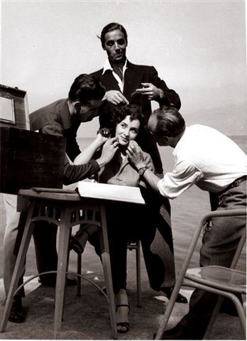 Gina Lollobrigida al concorso miss Italia, a Stresa, nel 1947